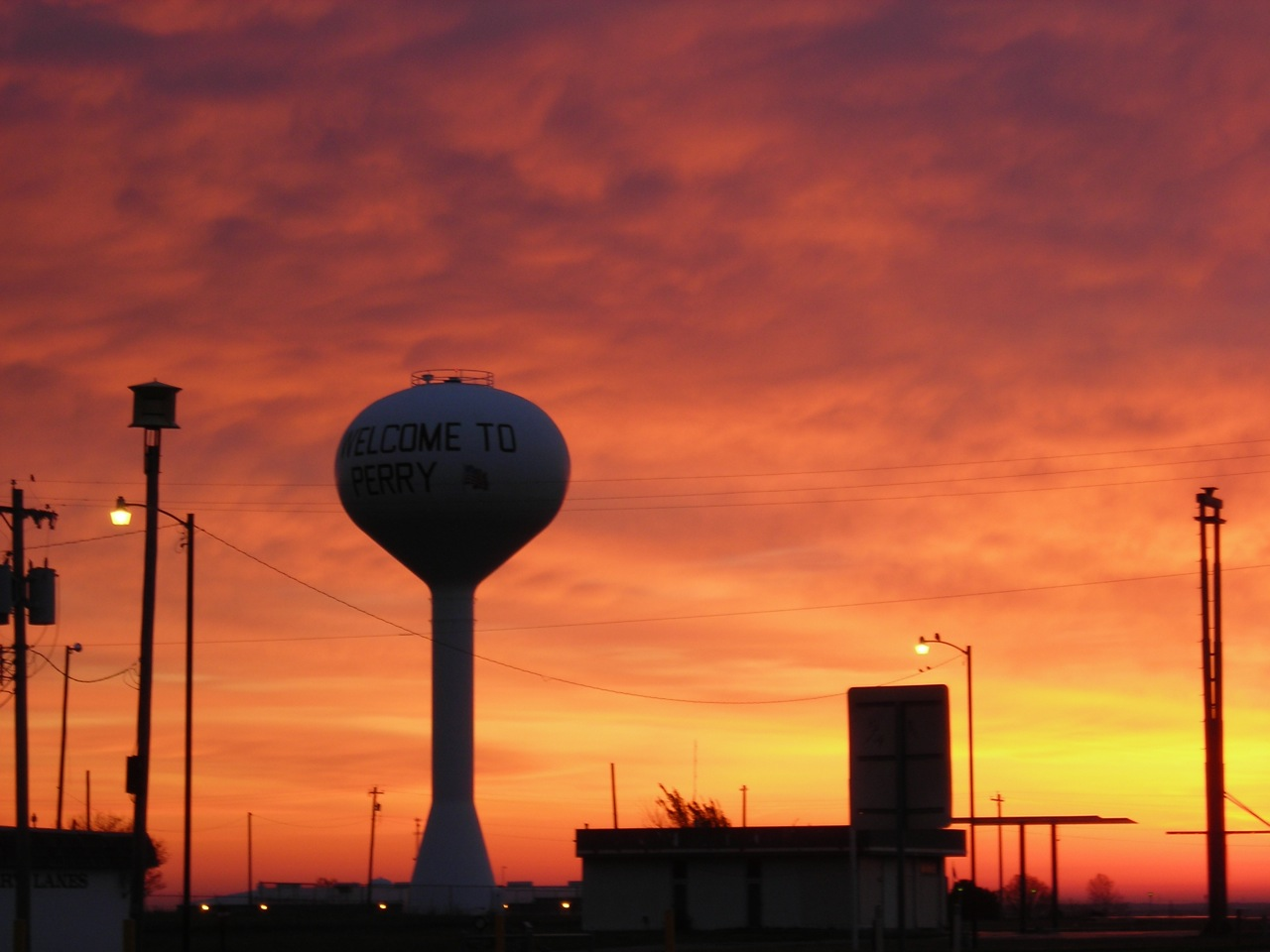 Sunrise over Perry, Oklahoma.